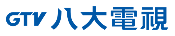 中文（台灣）: 八大電視2018年標誌